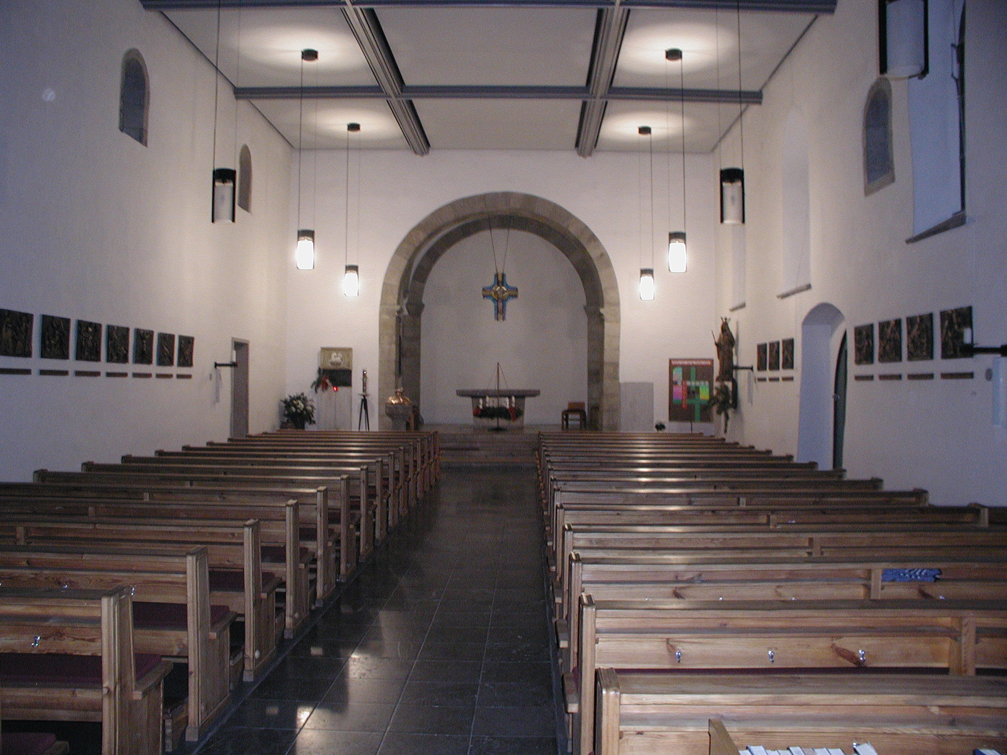 Blick in die St. Johann Baptist Kirche, Jena